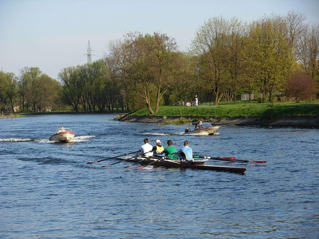 Kajakarze na Brdzie w Bydgoszczy